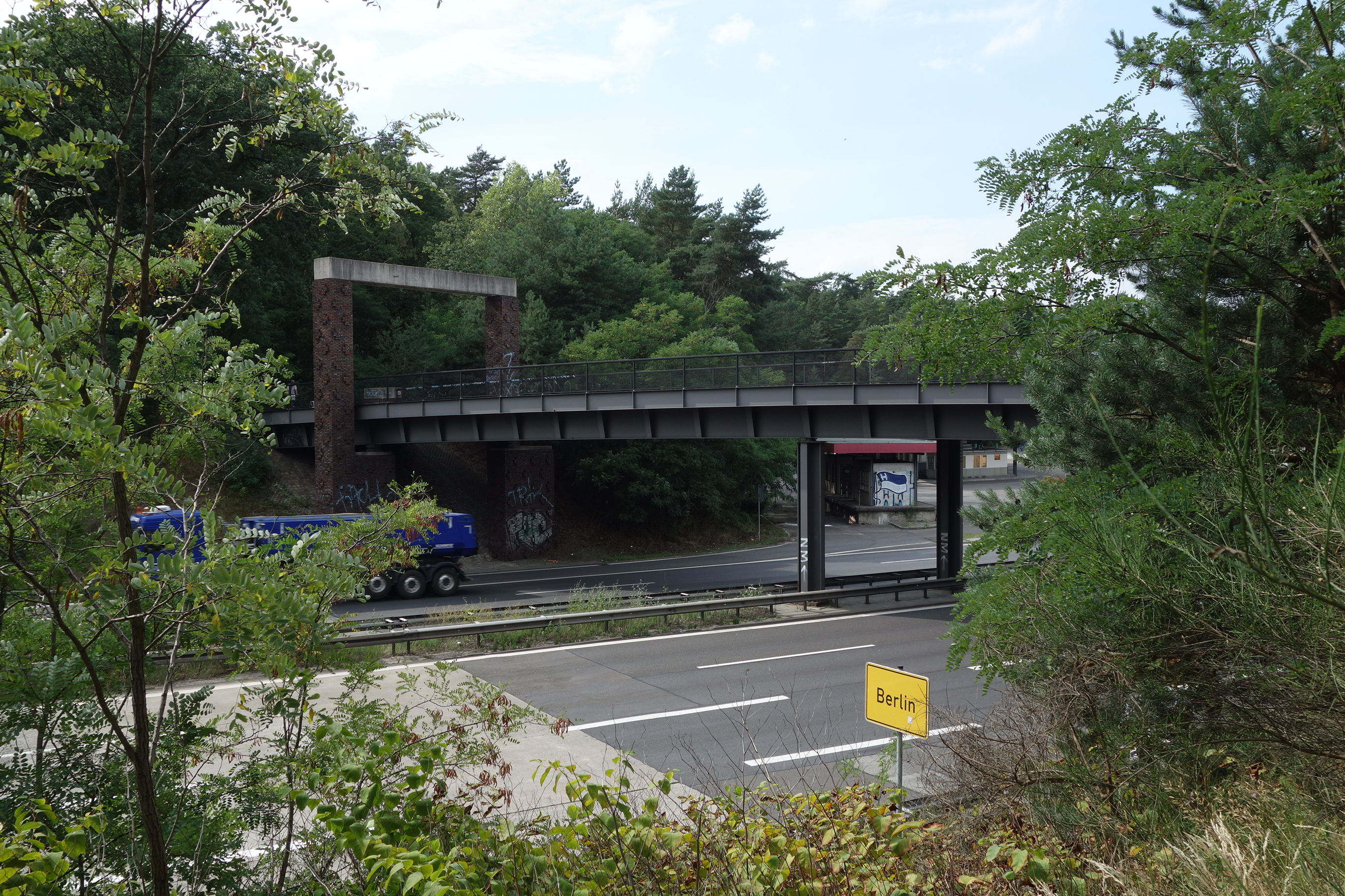 Bundesautobahn A115 an der Stadtgrenze mit der Königswegbrücke